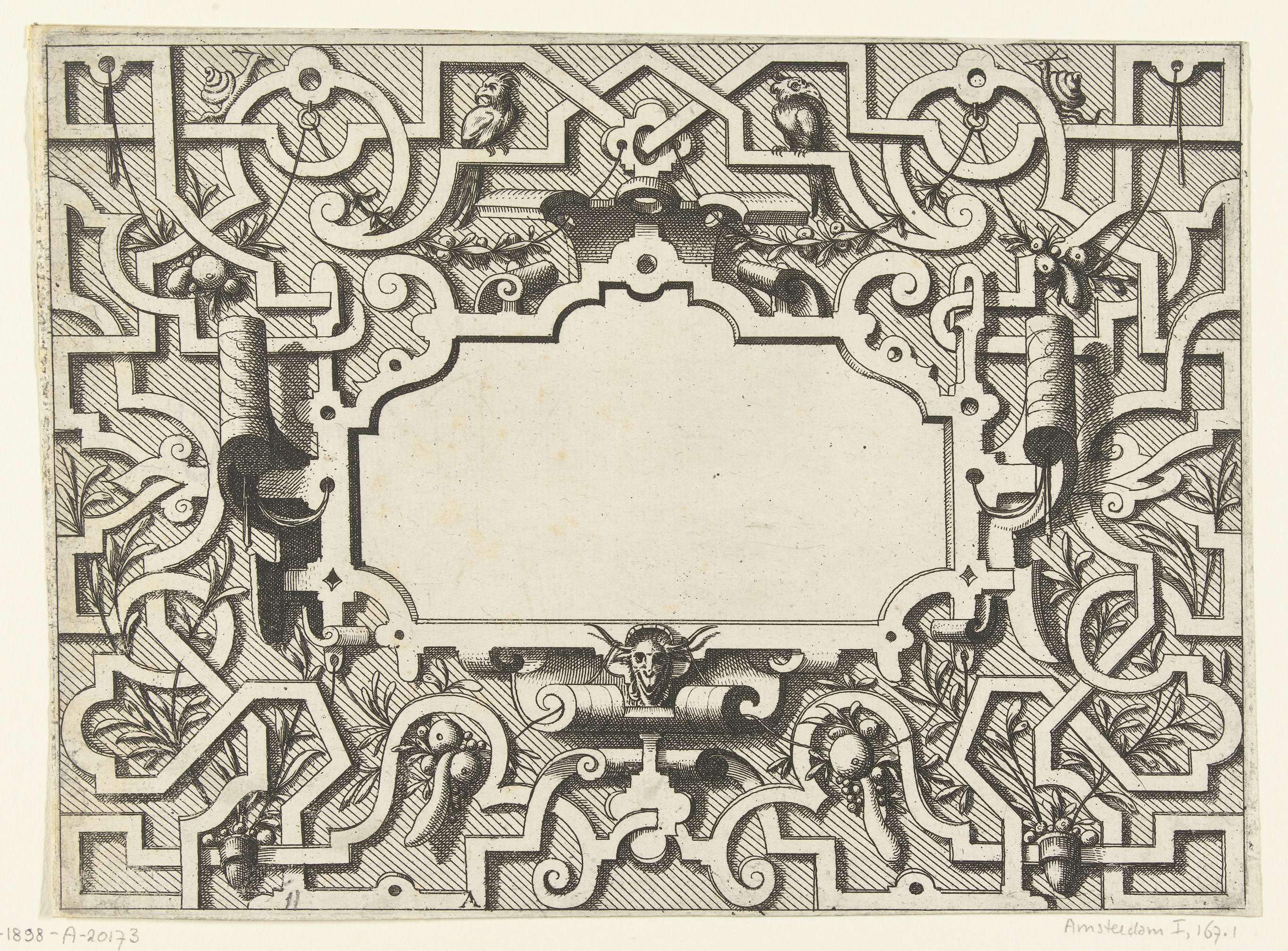 Bovenaan twee vogels en twee slakken. Onderaan hangen twee potten met vruchten en takken. Blad A uit serie van 16 bladen, geletterd A-Q. Gearceerde of gestippelde achtergrond.; Iconclasscode: 48A9876; Iconclasscode: 48A9873; Iconclasscode: 48A9832; Iconclasscode: 25F72(SNAIL); Iconclasscode: 25F3